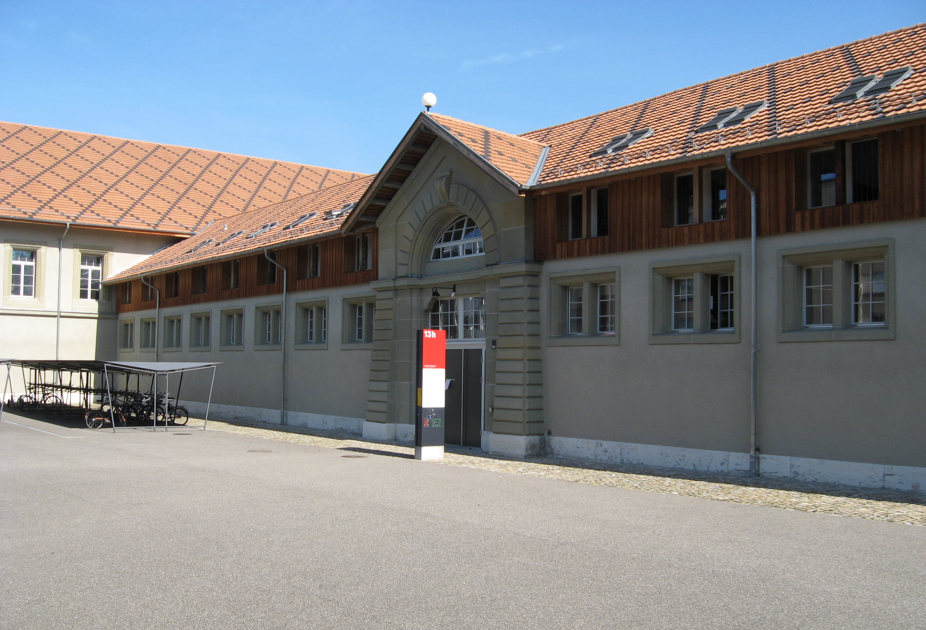 Hochschule der Künste Bern, Fachbereich Musik, Standort Papiermühlestrasse 13h, 3014 Bern